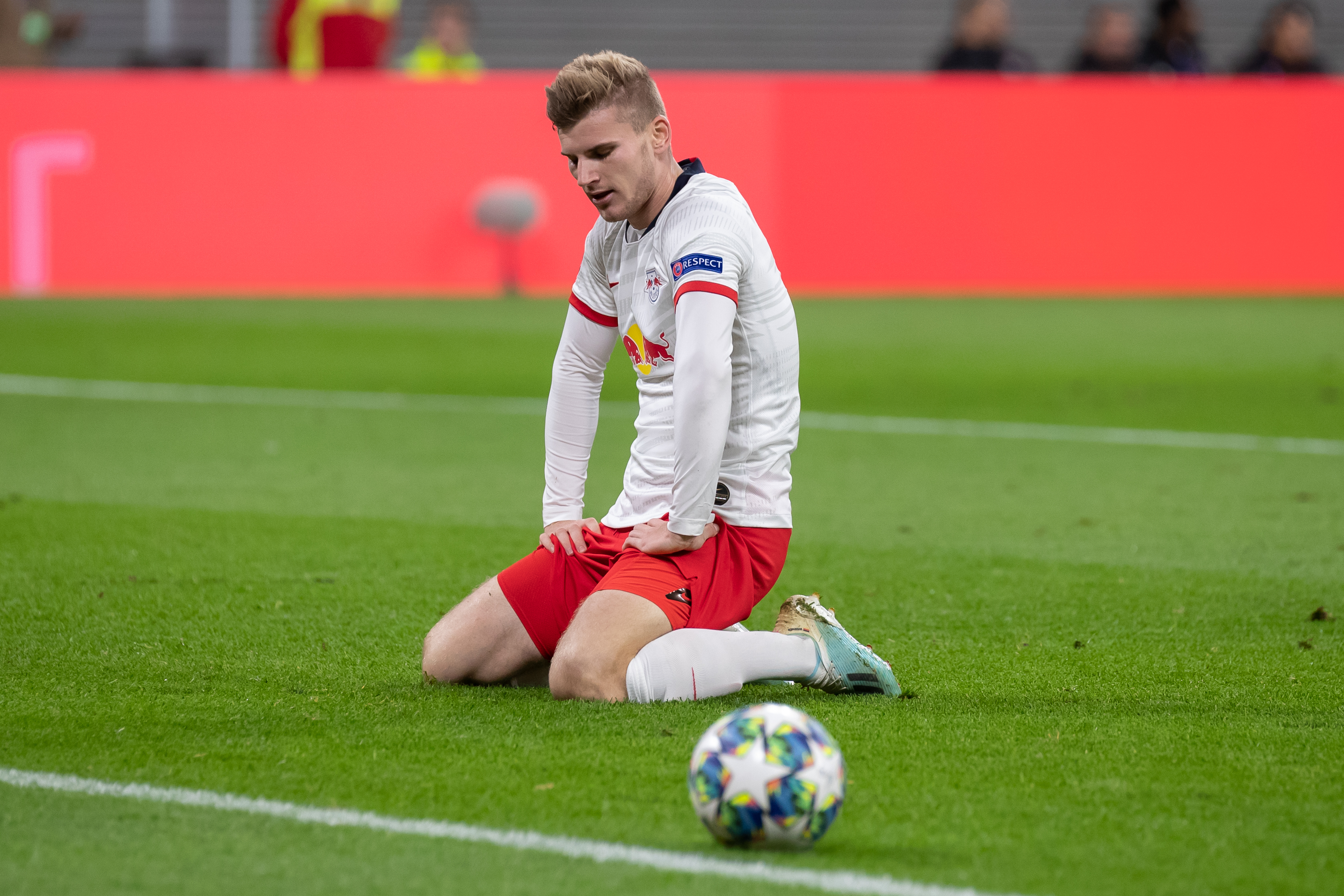 Fußball, Männer, UEFA Champions League, RB Leipzig - Olympique Lyonnais; Timo Werner (RB Leipzig, 11) kann sein Versagen nicht fassen, nachdem er völlig frei stehend über das Tor schoss; Enttäuschung, enttäuscht, Frustration, disappointed